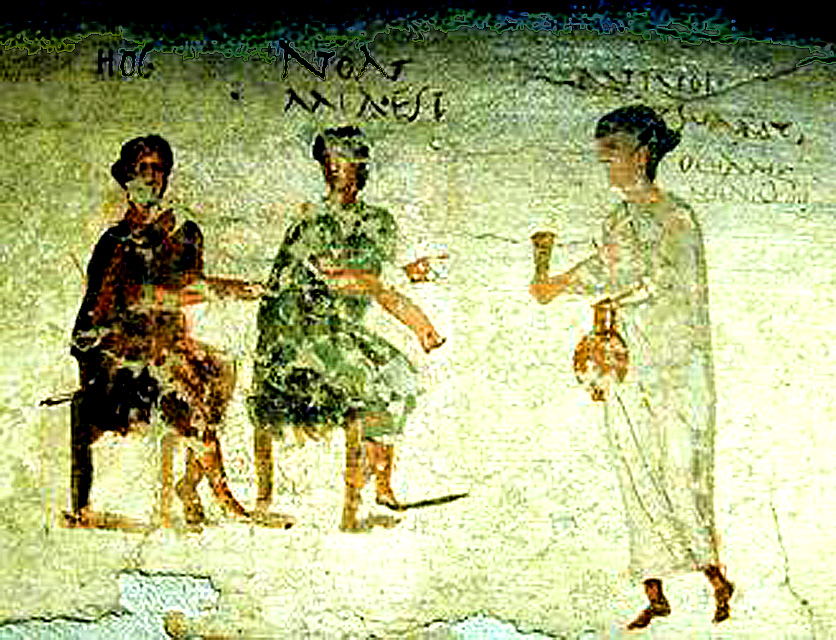 Caupona de Salvius Pompéi, servante apportant à boire